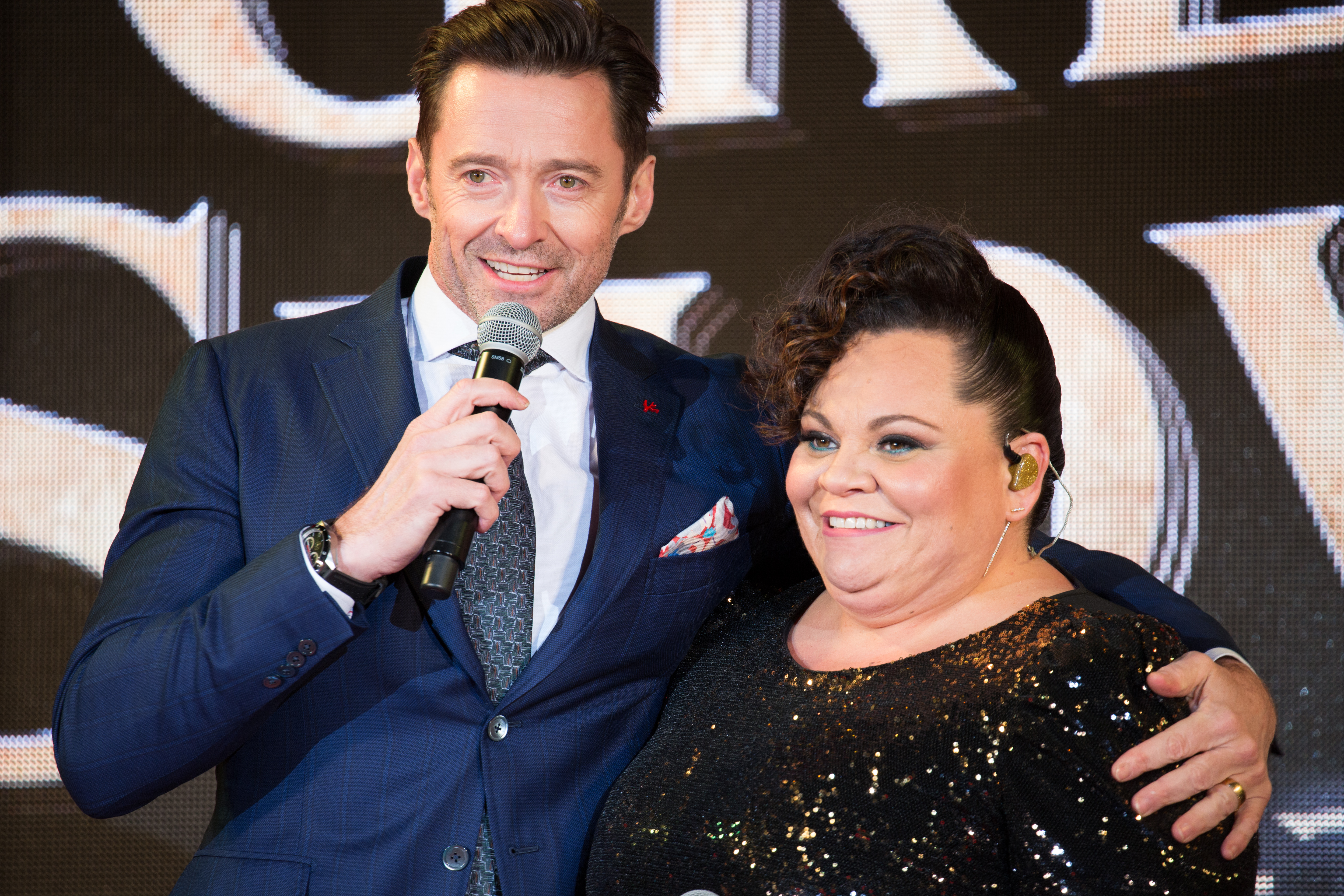 グレイテスト・ショーマン ジャパン・プレミア レッドカーペット ヒュー・ジャックマン キアラ・セトル